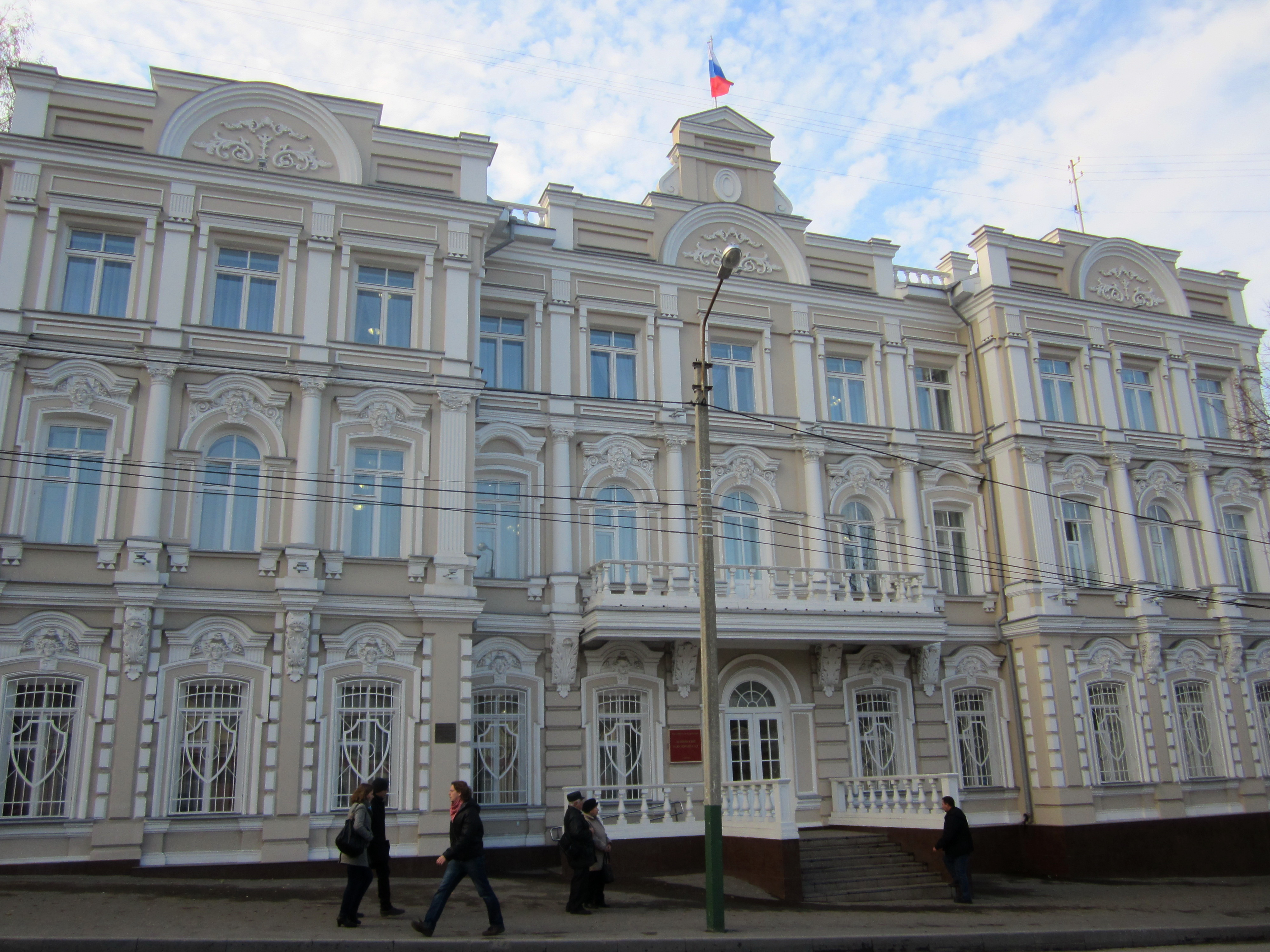 Дом жилой (Пензенская область, Пенза, улица Володарского, 36)